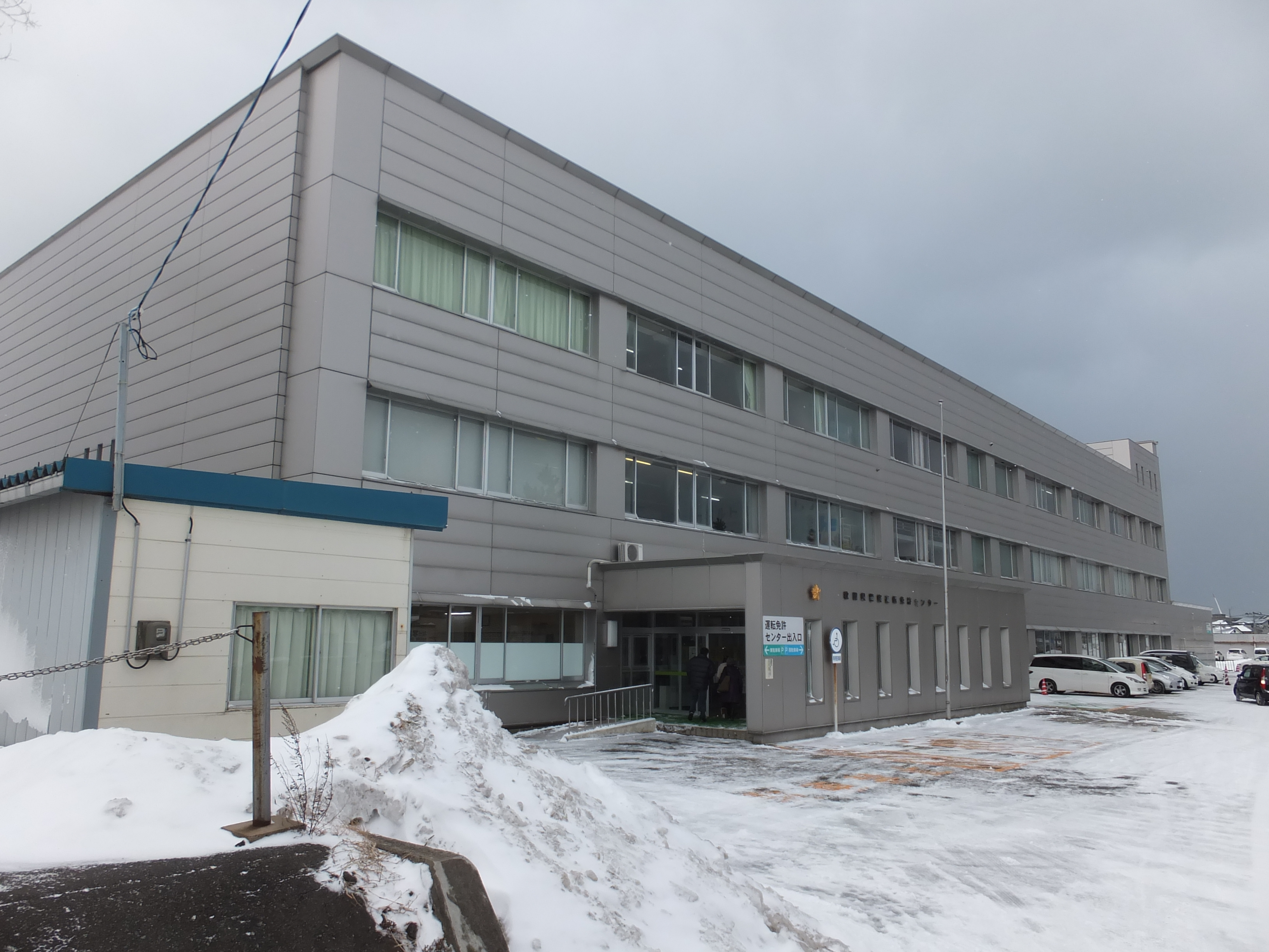 秋田県警察運転免許センター（秋田市新屋南浜町）